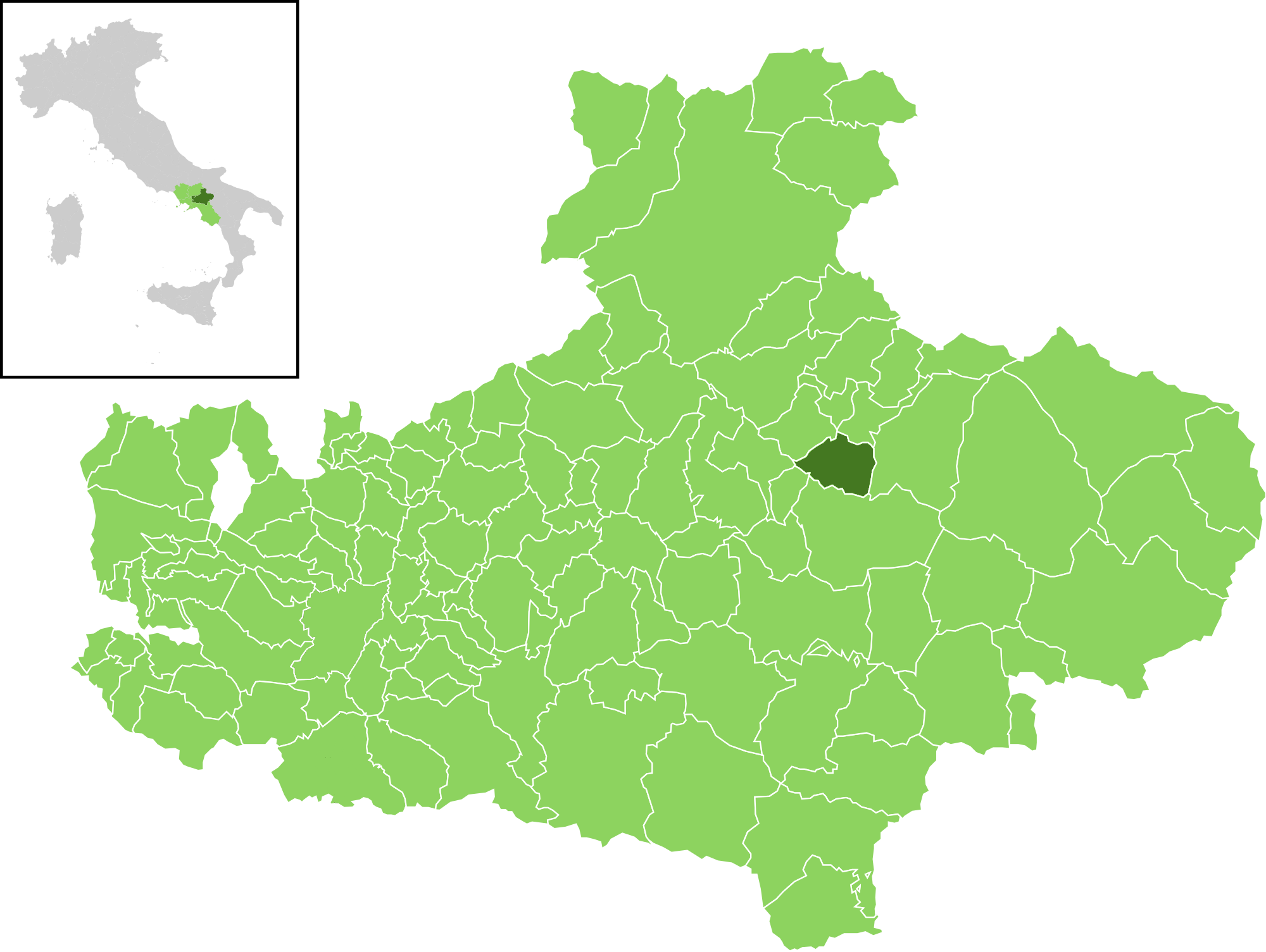 Il comune all'interno della provincia di Avellino